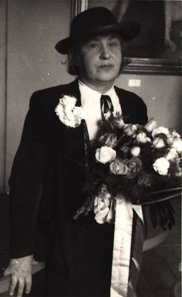 Helena Šrámková